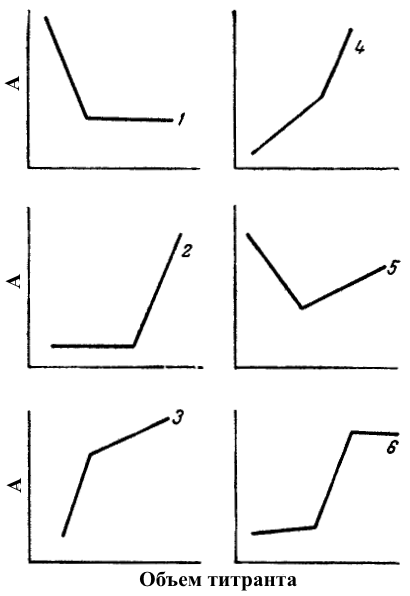 Кривые фотометрического титрование